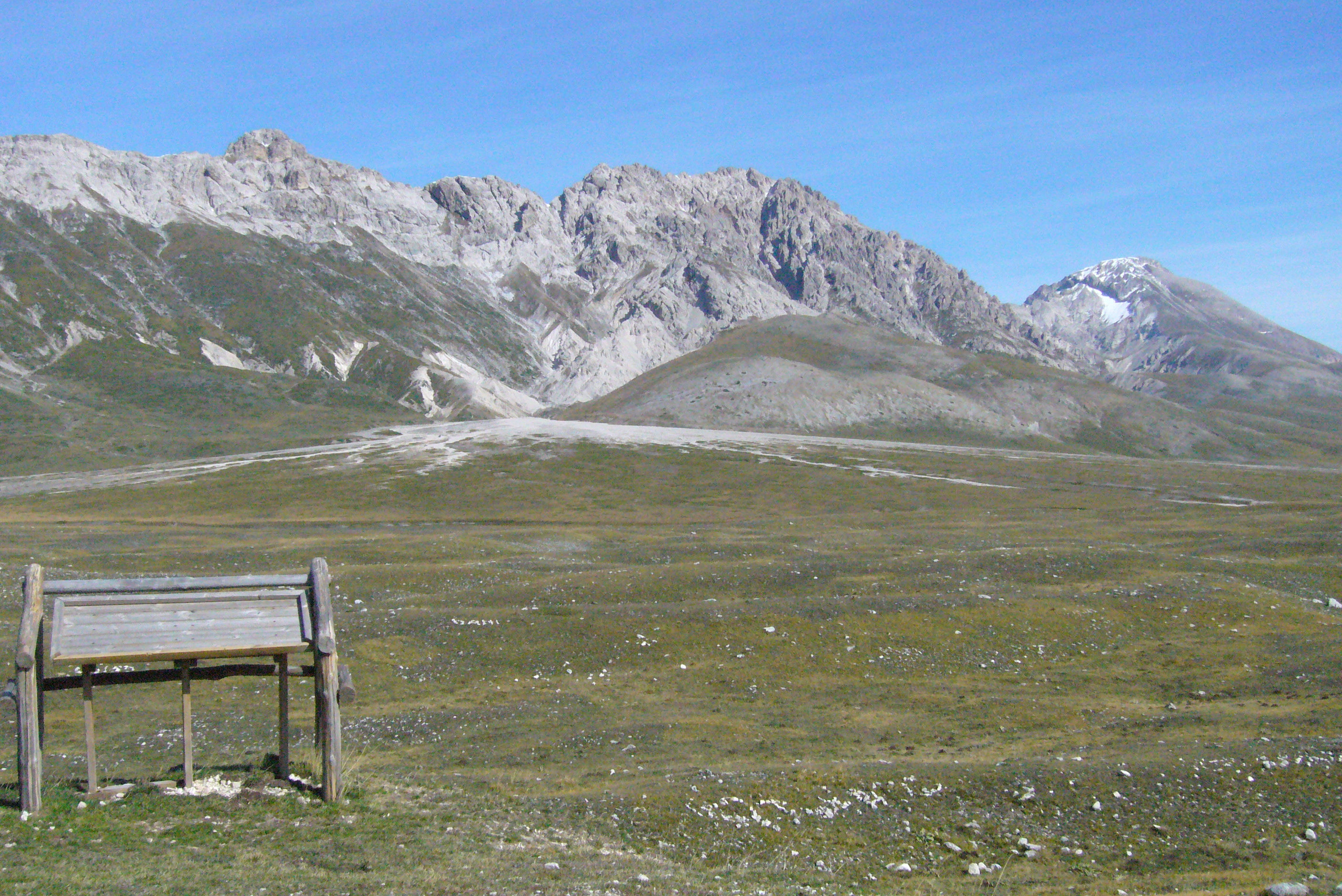 Vista sui Monti Prena e Camicia.